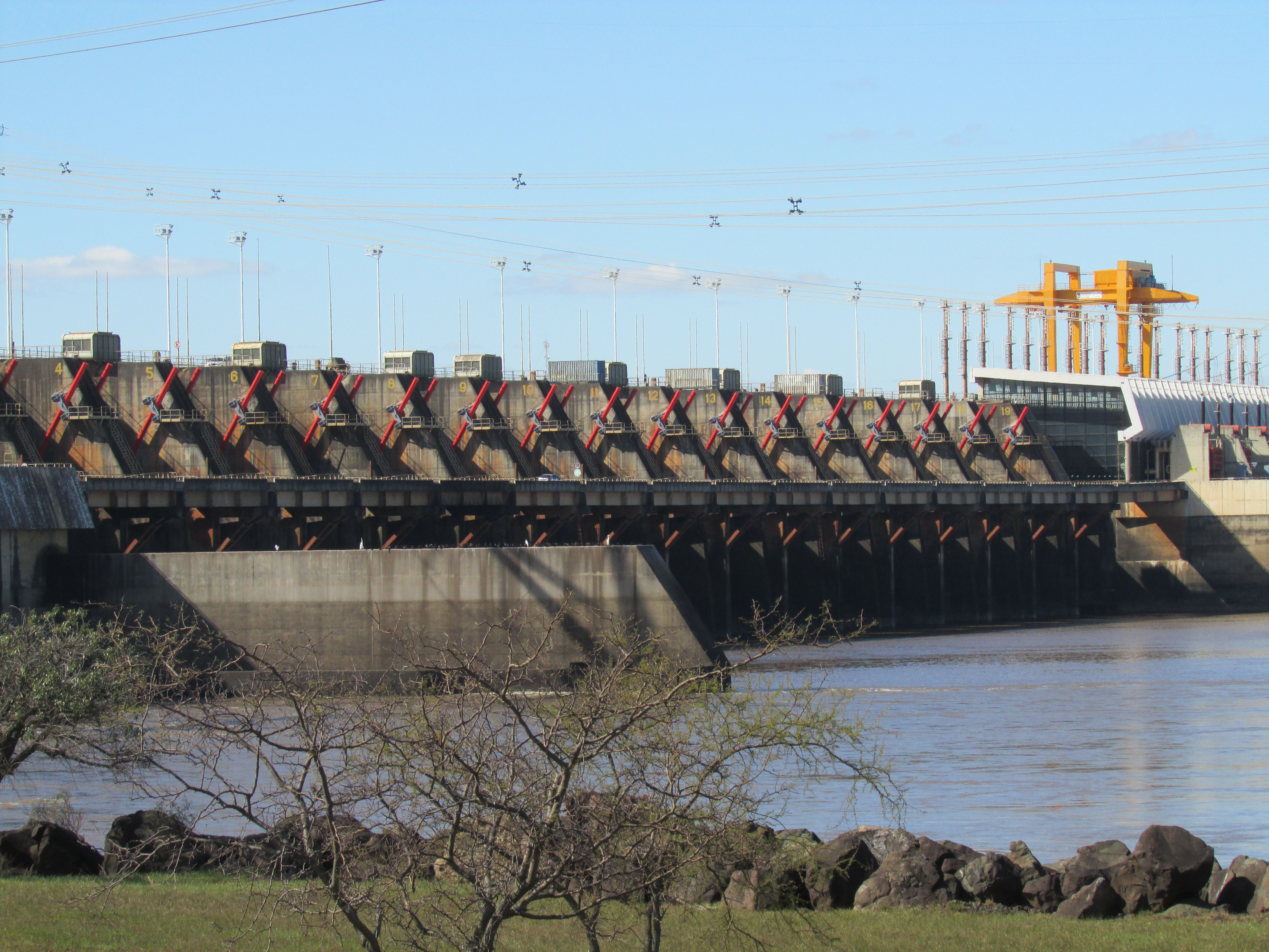 Compuertas de la represa de Salto Grande desde la costa del río Uruguay en el departamento Concordia, provincia de Entre Ríos, Argentina. El límite internacional con Uruguay se encuentra en la pared indicada con el número 10.